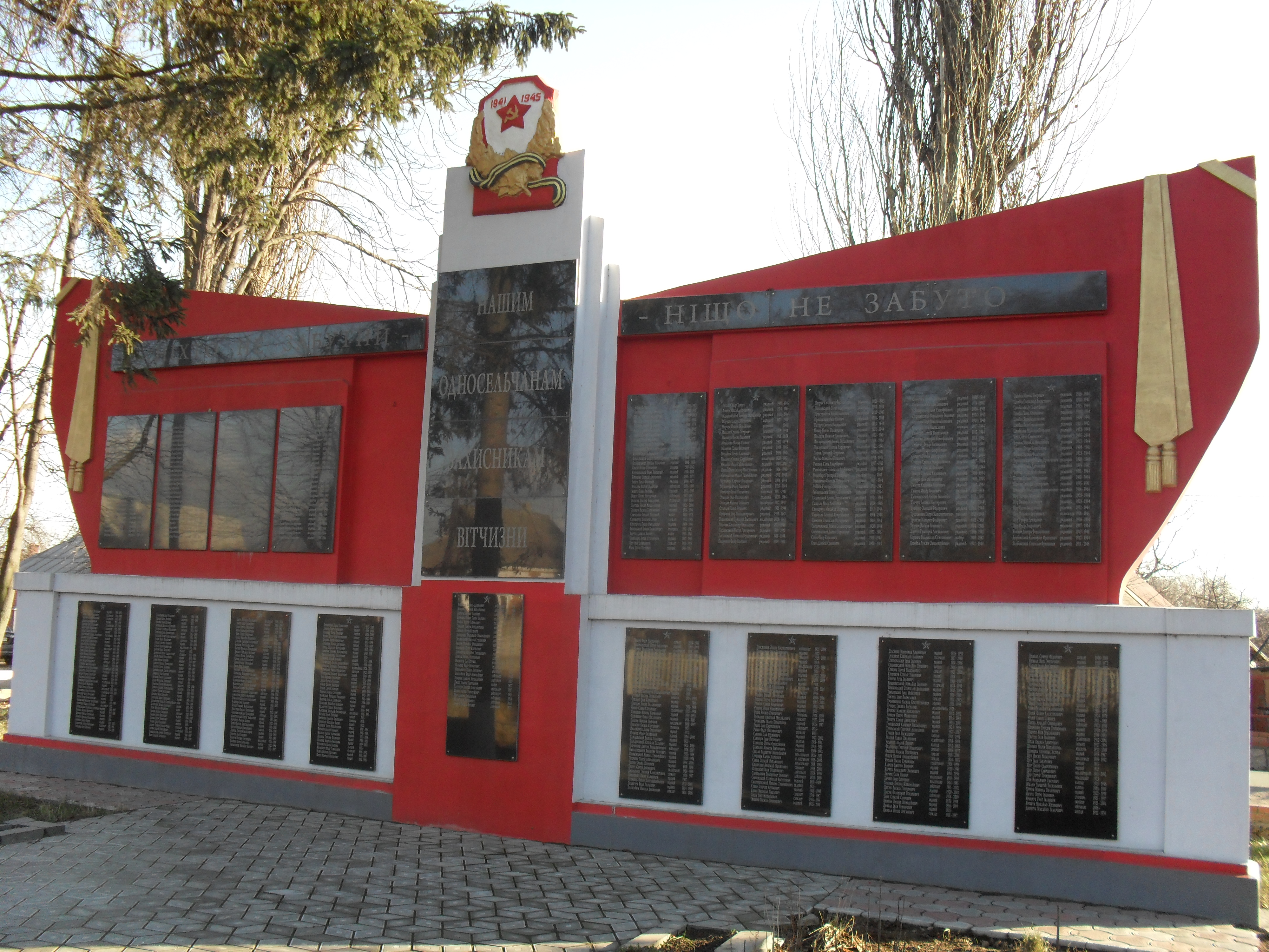 смт Турбів. Меморіал воїнам, що брали участь у Великій Вітчизняній війні